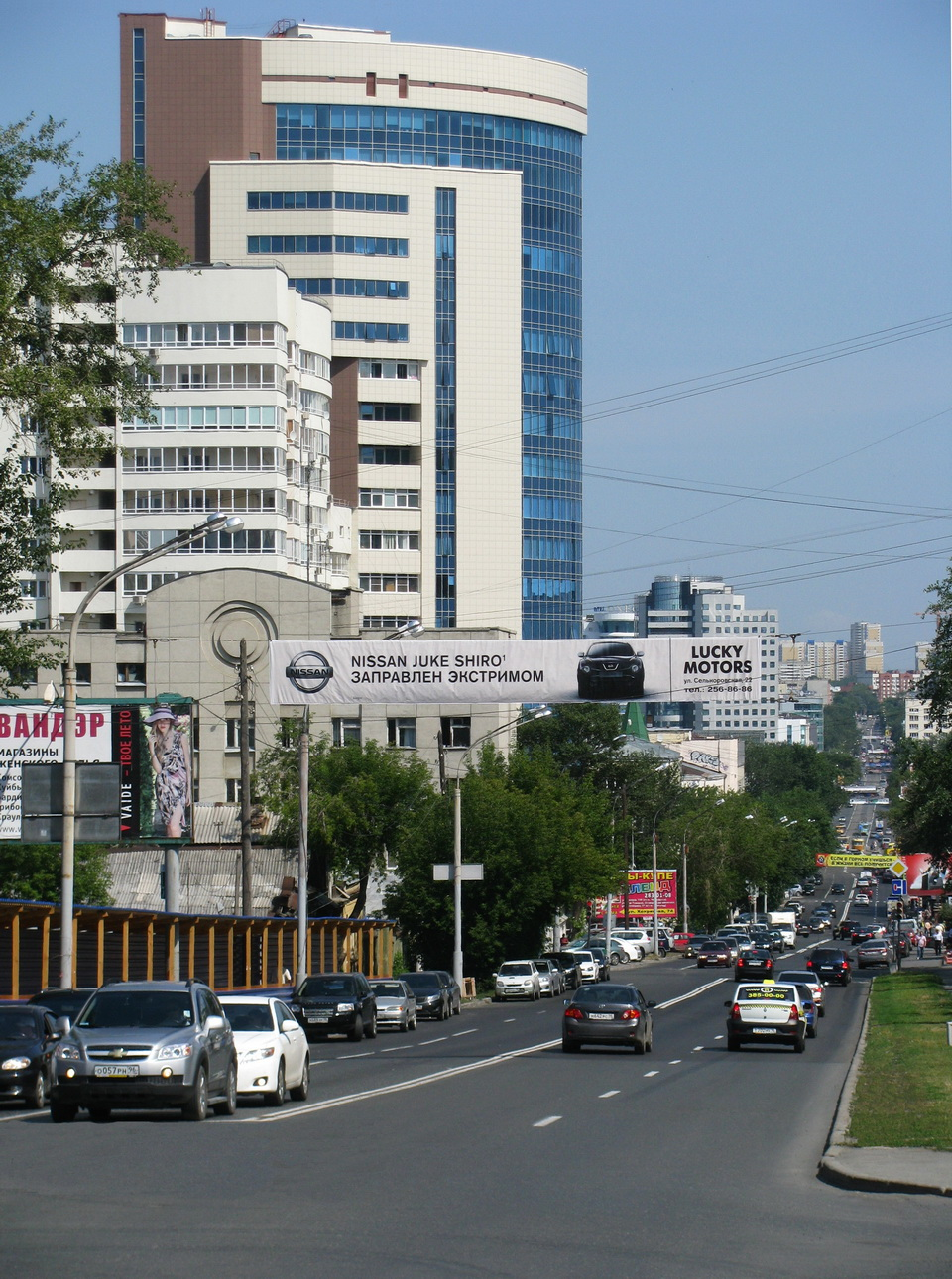 Перспектива улицы Куйбышева (бывш. Сибирский проспект) в Екатеринбурге. Вид от пересечения с ул. Шейнкмана.